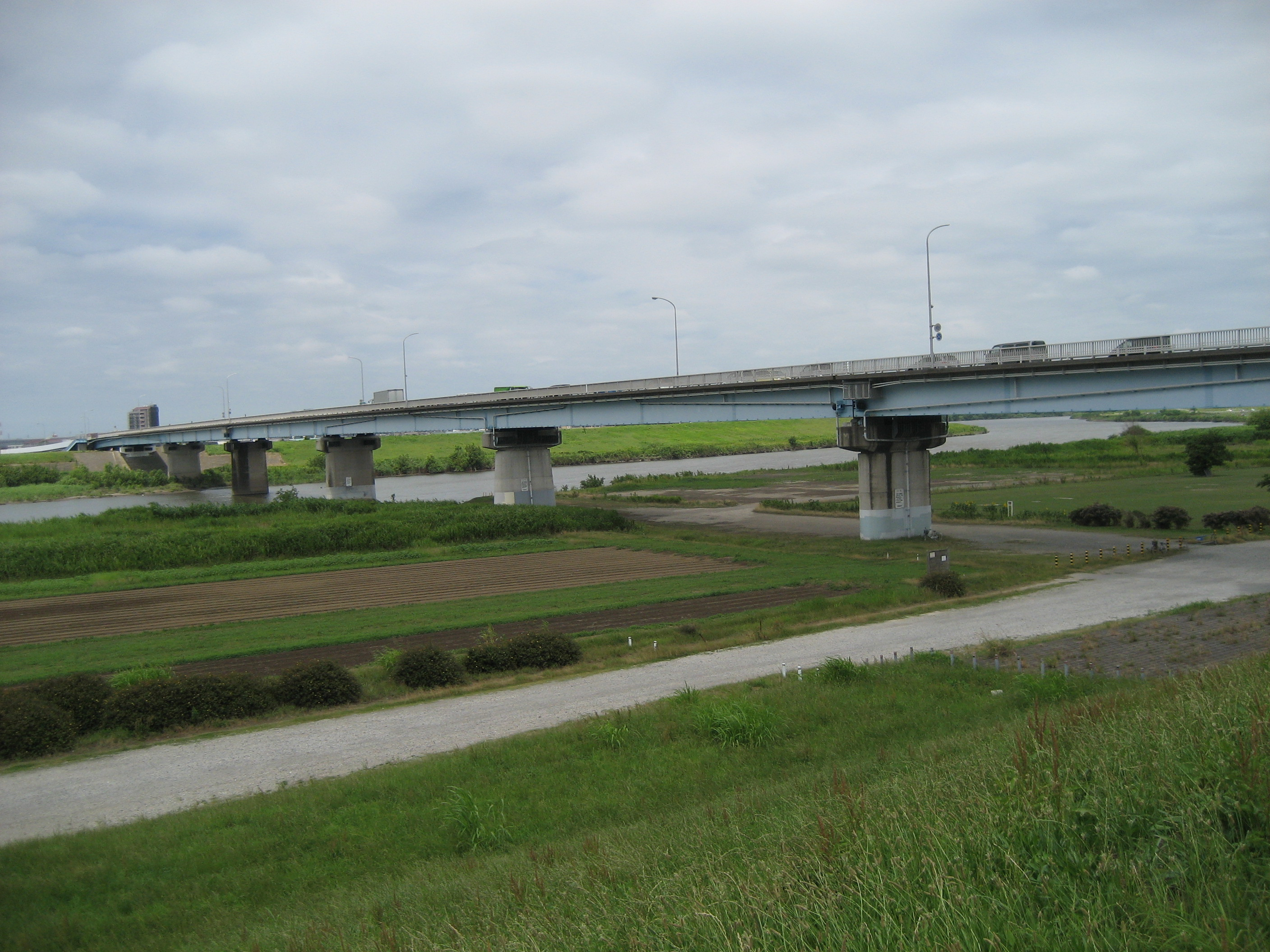 千葉県道295号線上葛飾橋（松戸市側江戸川土手より撮影）